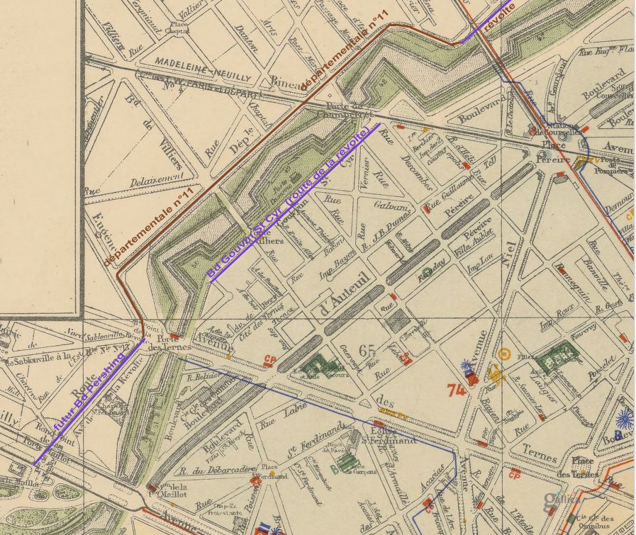 Plan cadastral de la ville de Paris... / établi d'après les documents officiels les plus récentes et comprenant l'Exposition universelle de 1900, par Mme Max Mabyre ajouté en superposition tracé route de la révolte